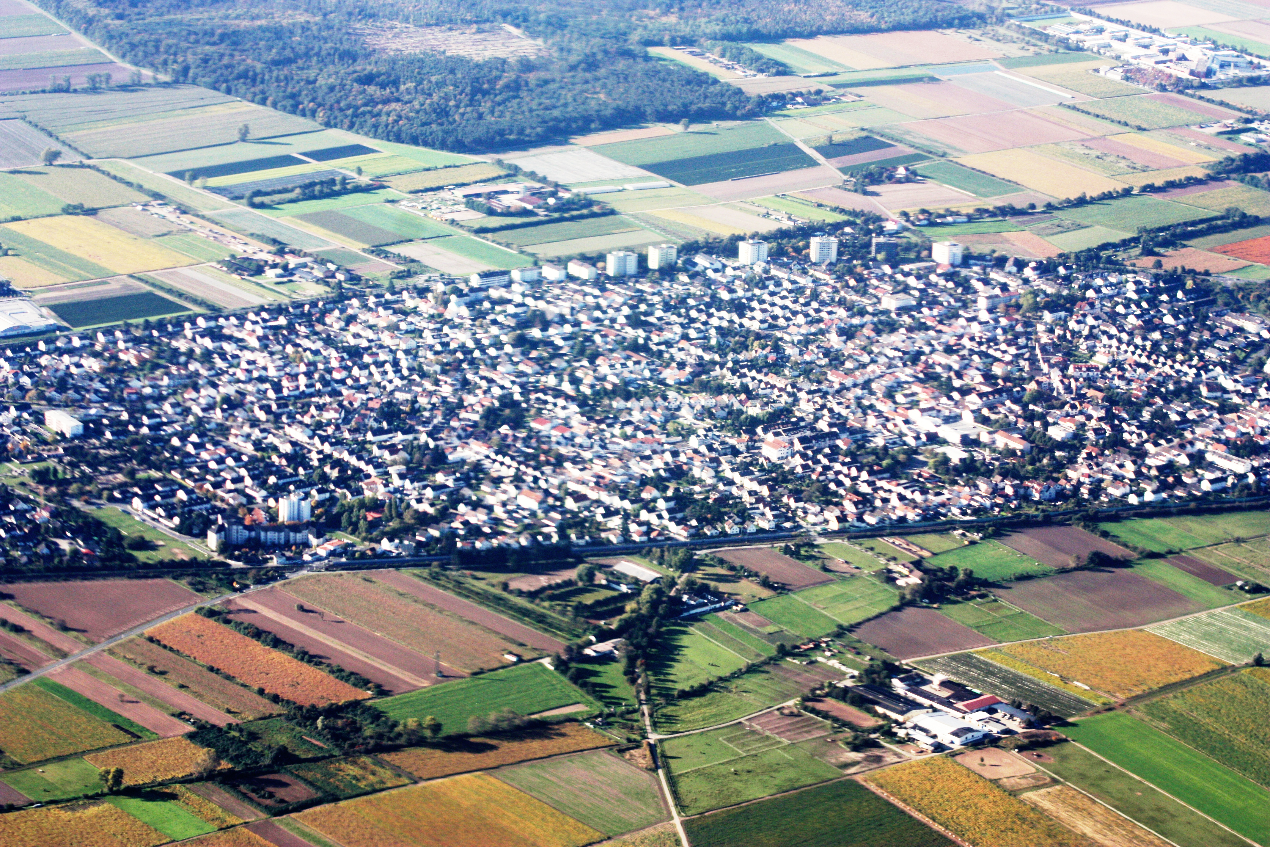 1 Flug von Frankfurt/Main nach Sofia; Start 10:12 MEZ; Landung 13:06 MEZ; Oktober 2010; Weiterstadt